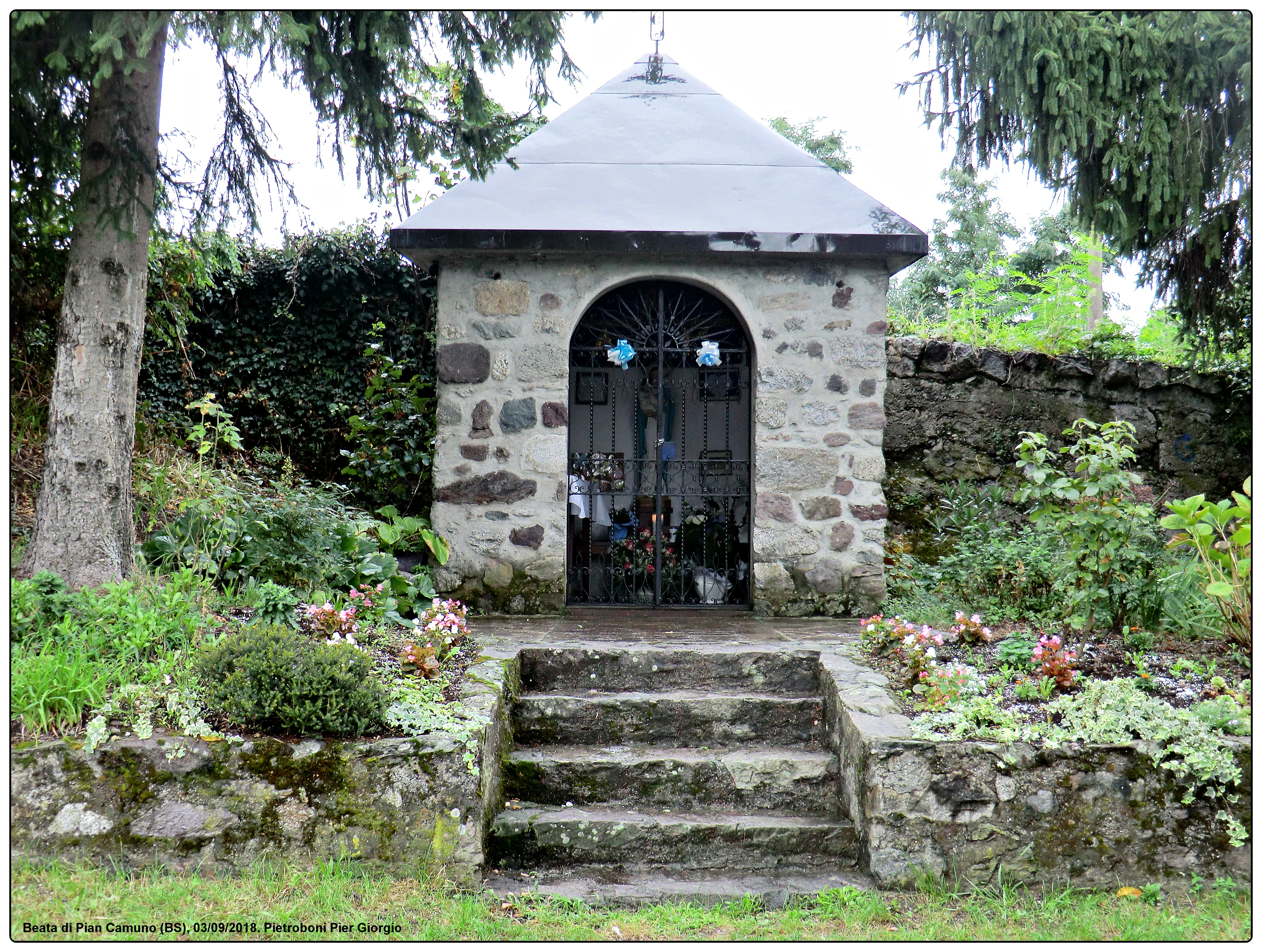 Santella dedicata alla Madonna in via Torre Alta nella frazione Beata di Pian Camuno (BS)